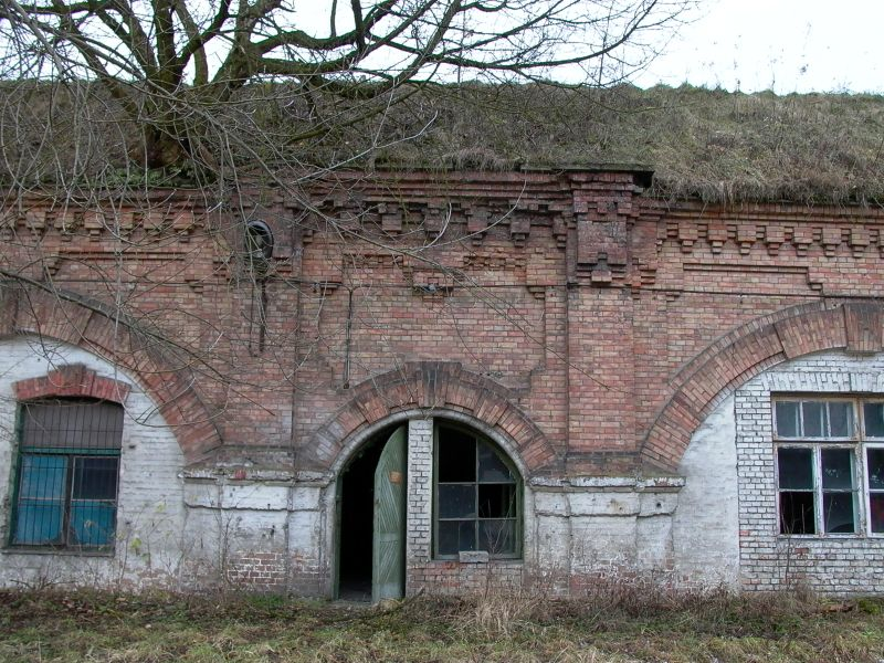 Zdjęcie przedstawia bramę koszar szyjowych Fortu V "Włochy" Twierdzy Warszawa. Autor: Zbigniew Strucki